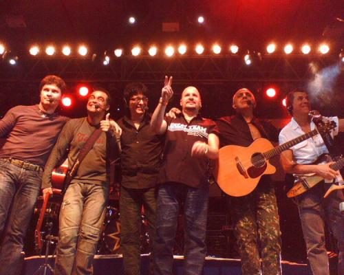 Show da Banda Roupa Nova.